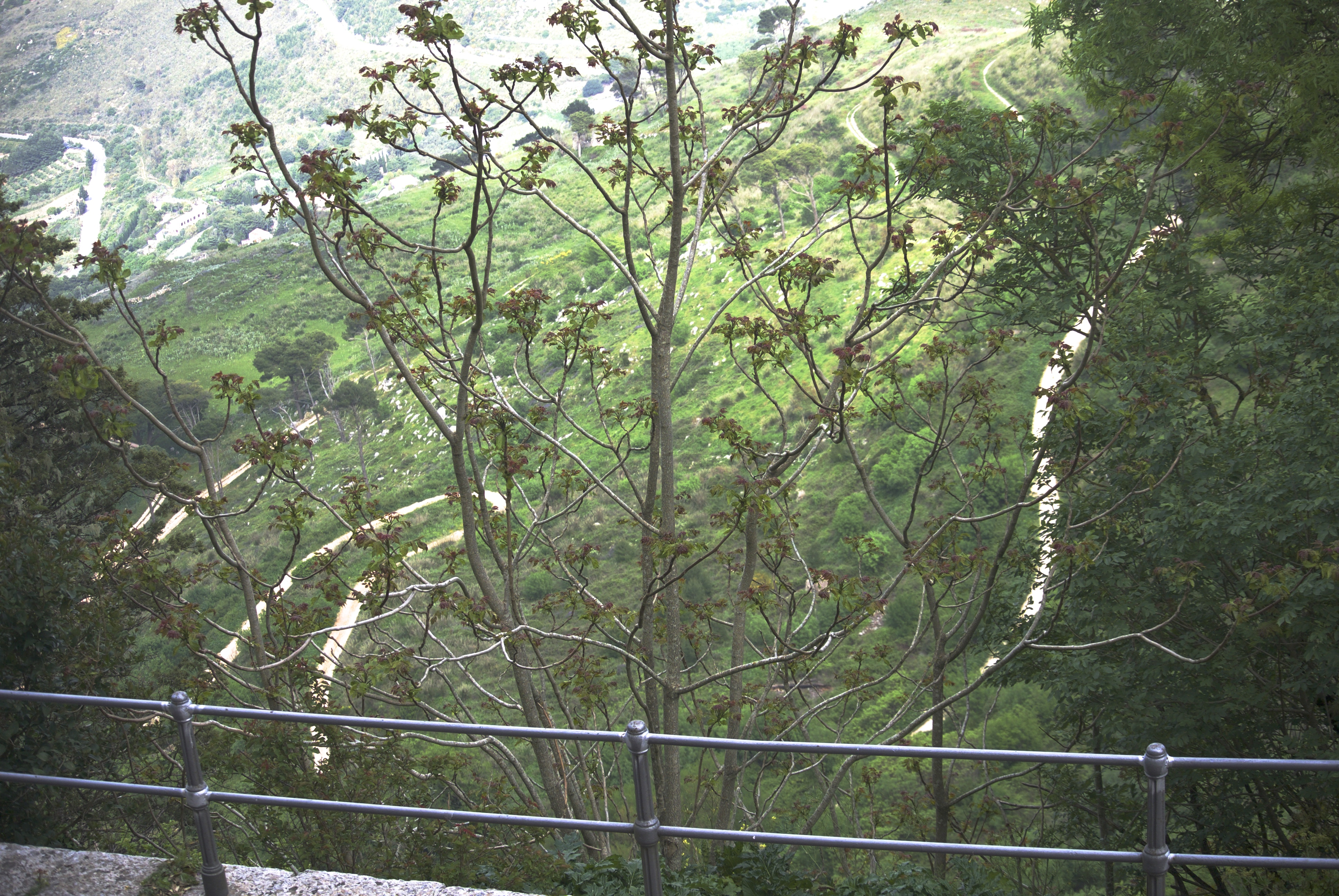 Ailante glanduleux Erice